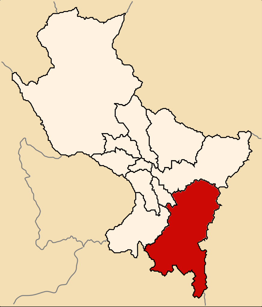 Mapa de la antigua provincia de Tinta